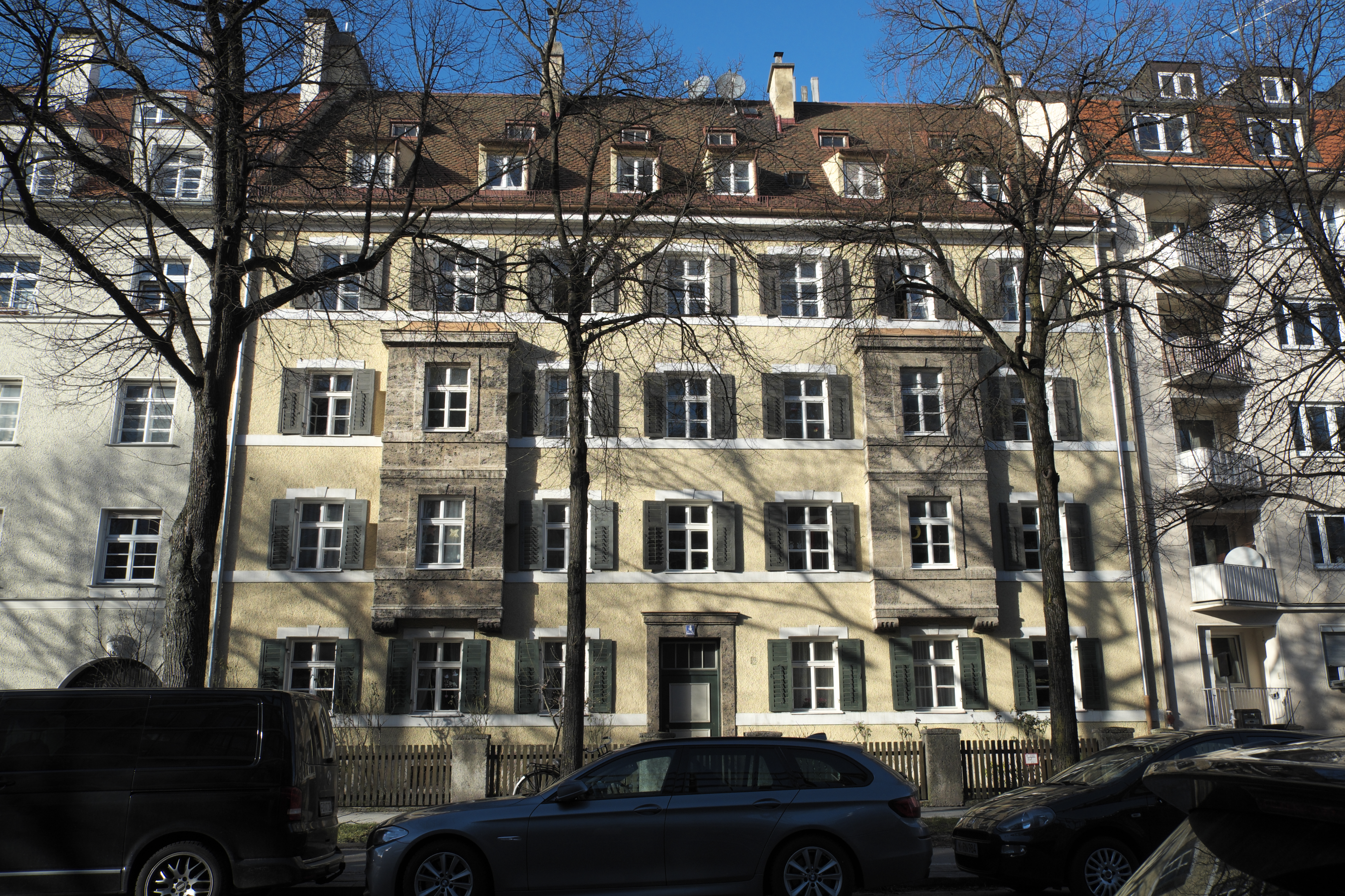 Mietshaus in der Heimeranstraße 4 im Stadtbezirk Schwanthalerhöhe in München (Bayern/Deutschland), 1911/12 von Hans Grässel erbaut